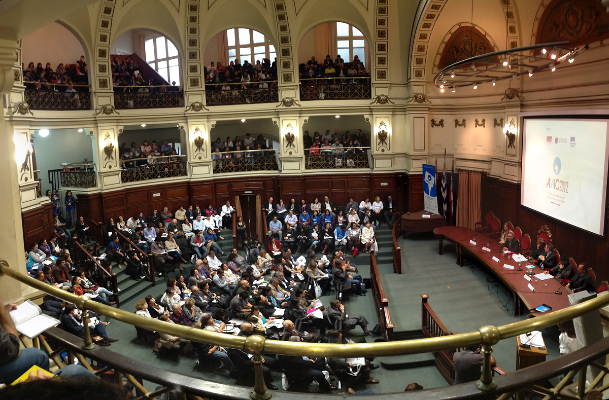 Paraninfo de la Universidad de la República. Apertura del Congreso de ALAIC 2012, en Montevideo, Uruguay.